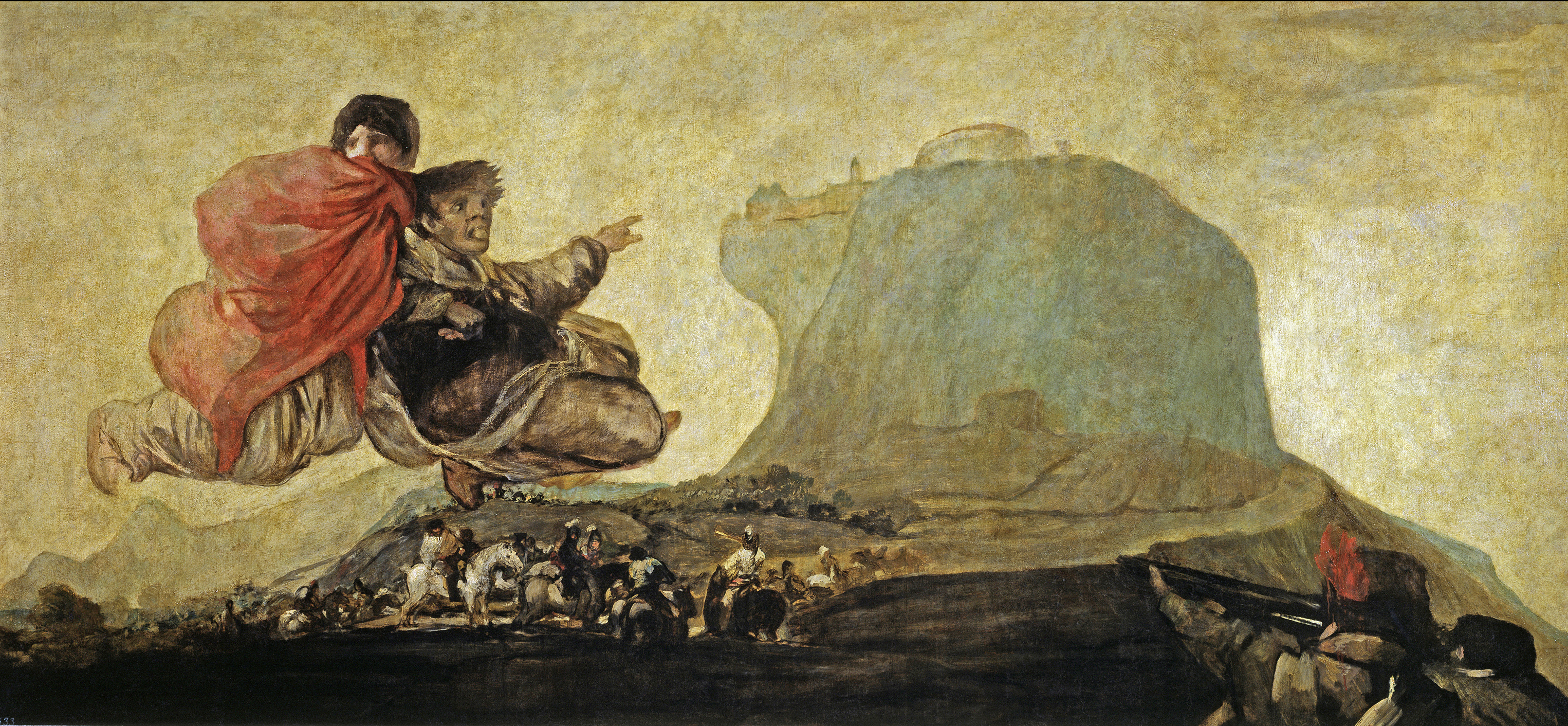 Visión fantástica o Asmodea. Óleo sobre muro trasladado a lienzo. 123 x 265 cm. Museo del Prado (Madrid).